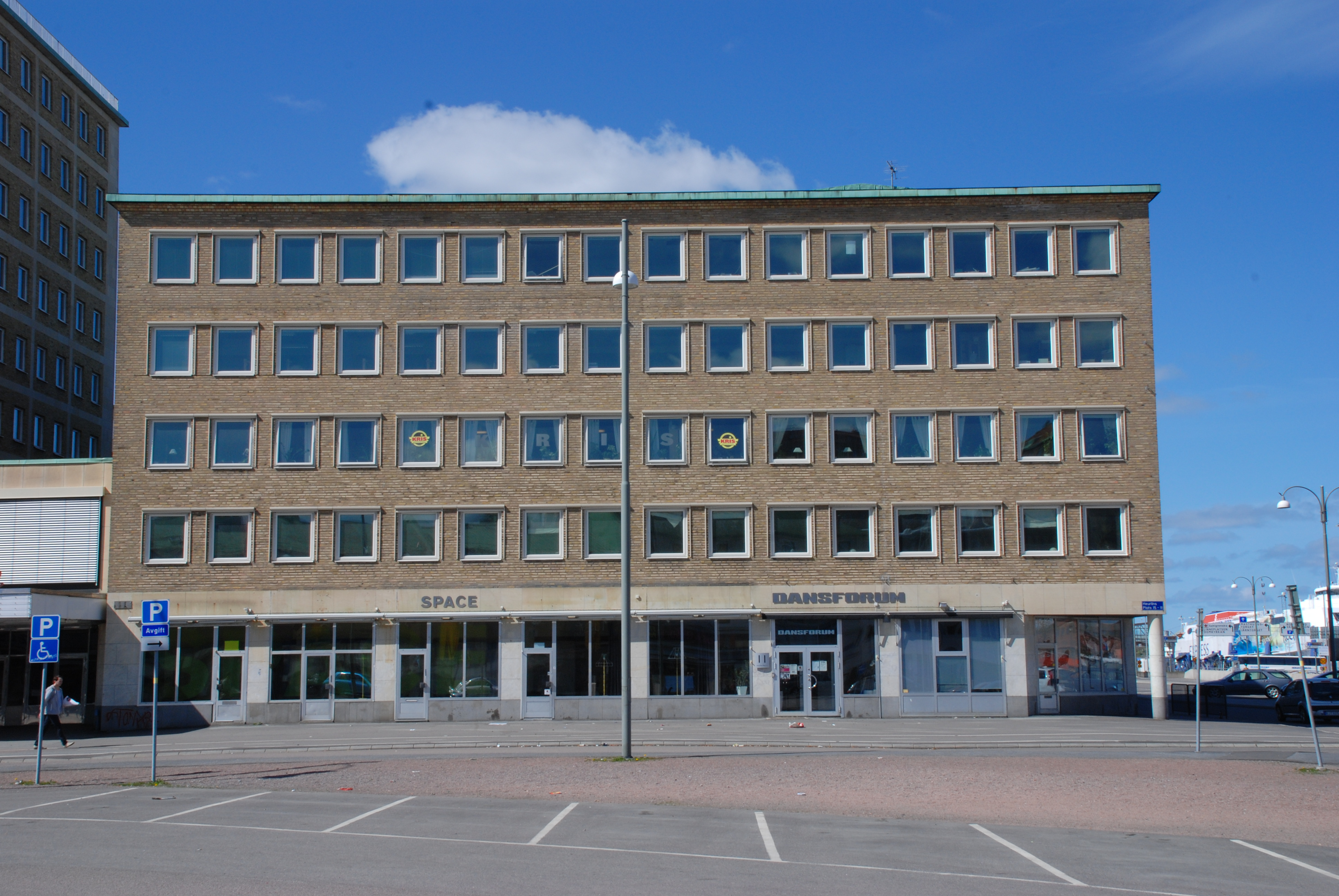 Folkets hus i Göteborg vid Heurlins Plats, sett från Järntorgsgatan.